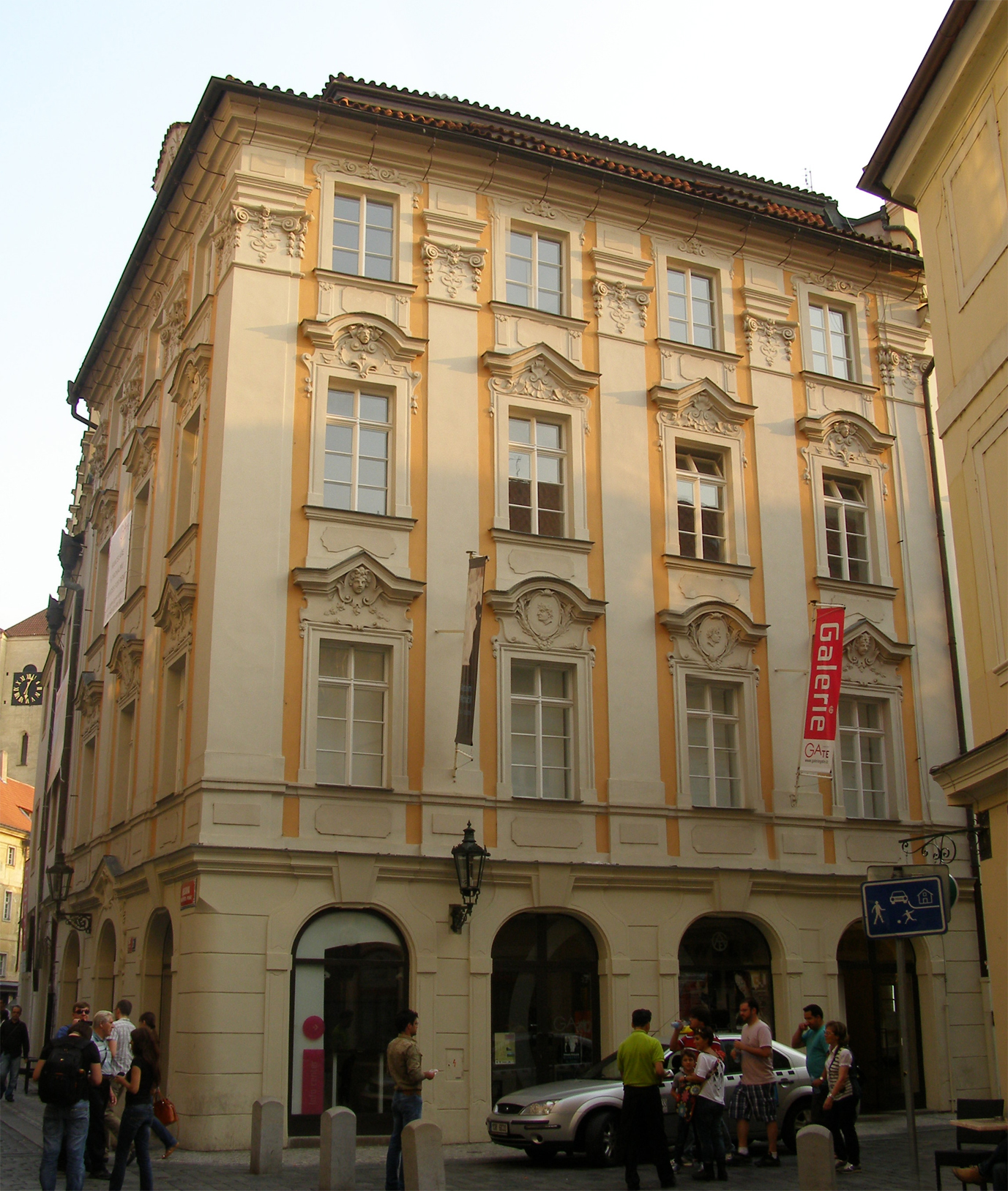 Městský dům U zlaté slámy, Praha 1-Staré Město, Husova 156/21, Karlova 156/34.